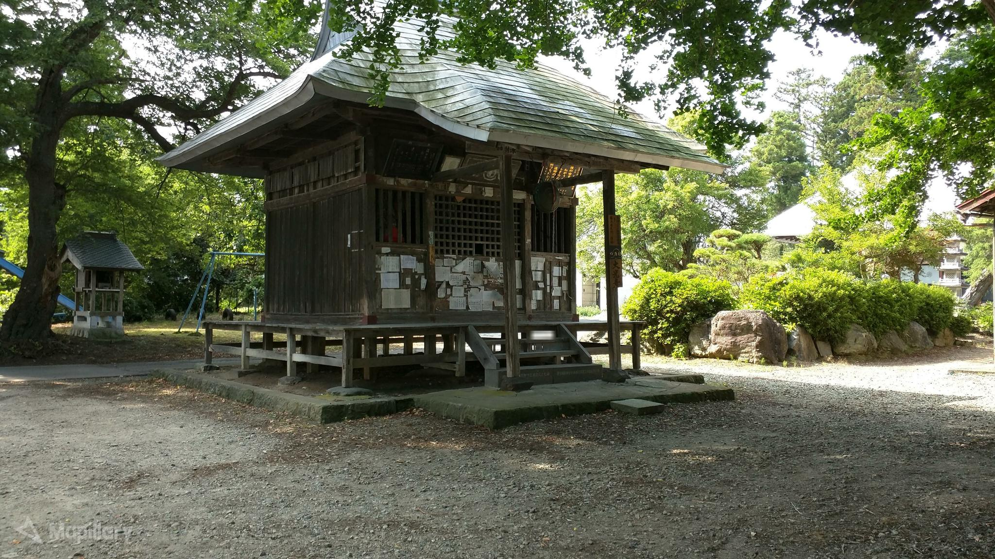 会津三十三観音 大九番札所 遠田観音堂